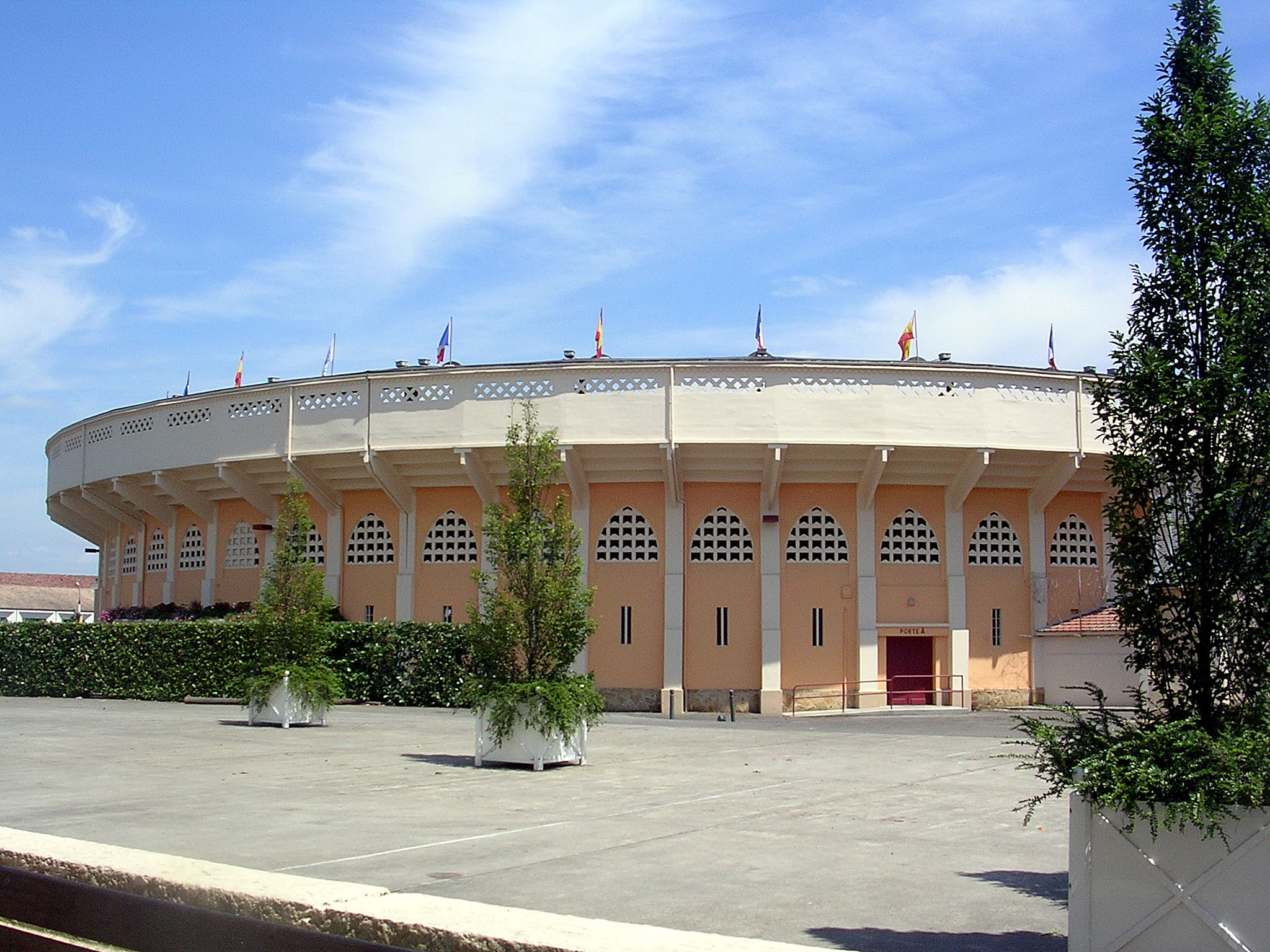 Arènes du Plumaçon à Mont-de-Marsan (Landes, France)